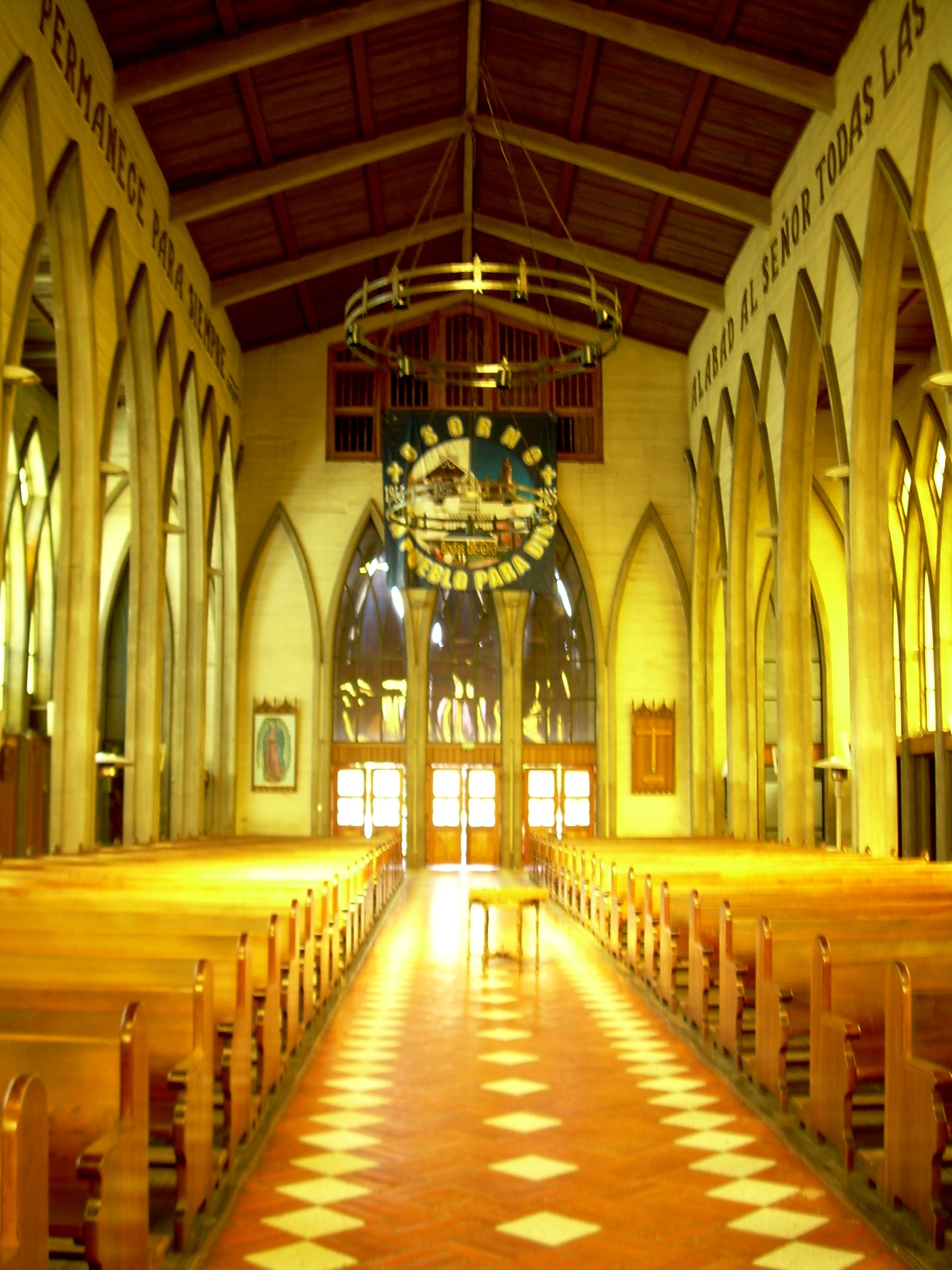 INTERIOR CATEDRAL DE OSORNO.jpg